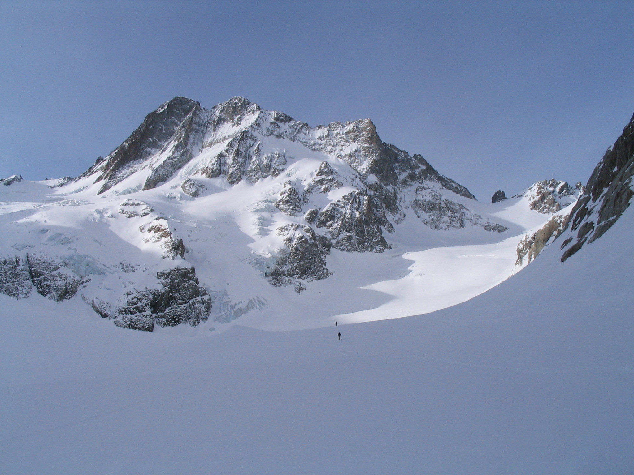 Bans face nord avril 2006